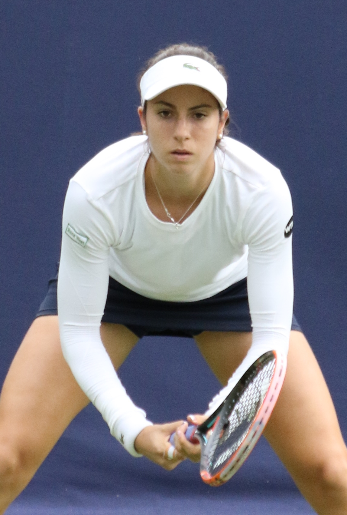 McHale BM16 (3)